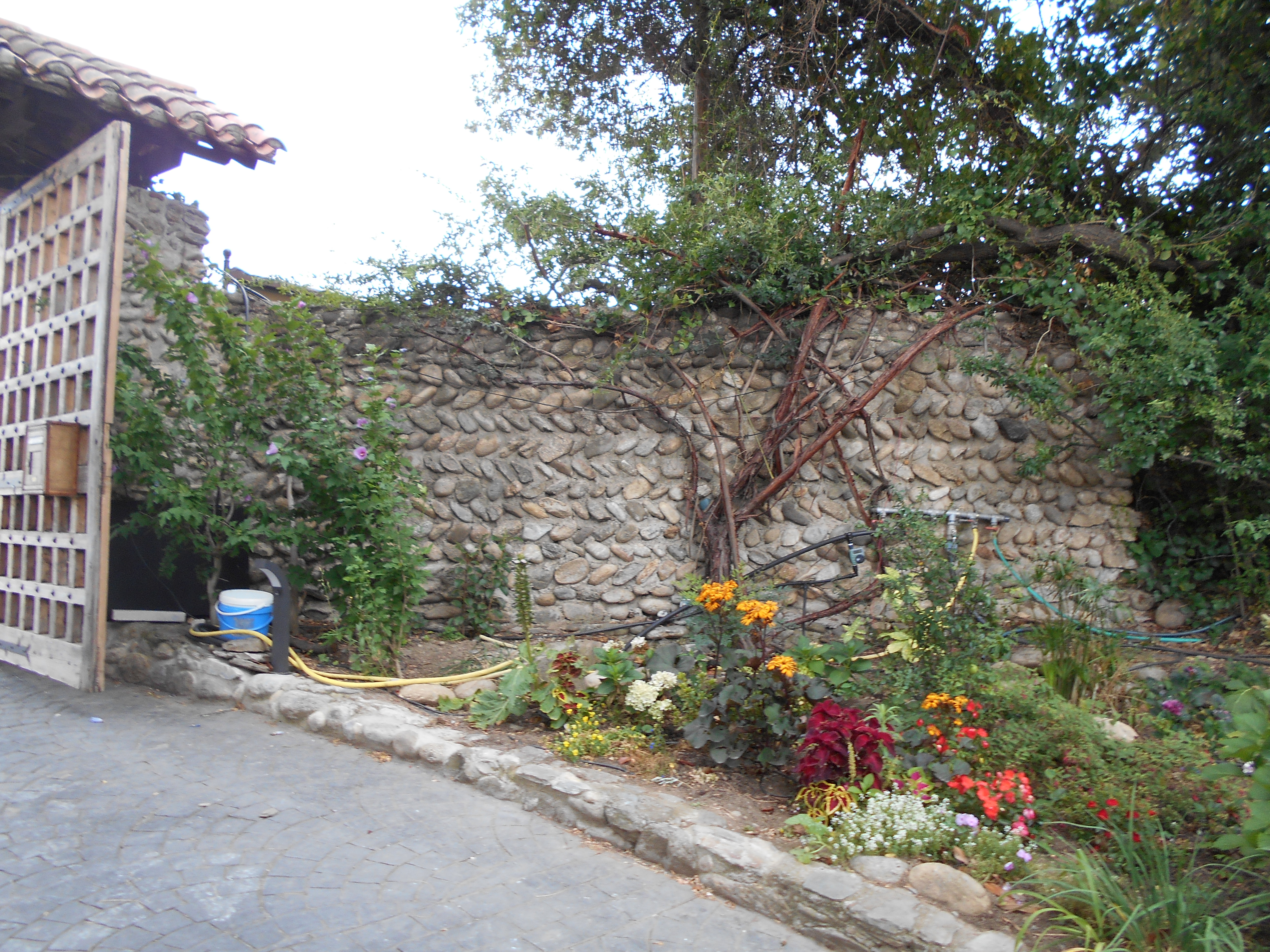 Mur medieval al Convent del Remei